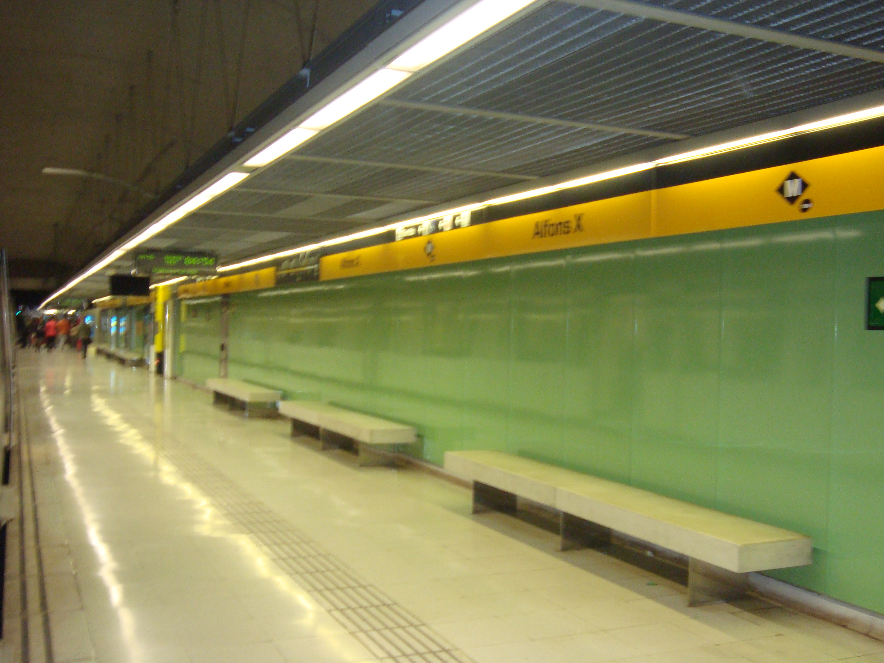 Estació d'Alfons X del metro de Barcelona.